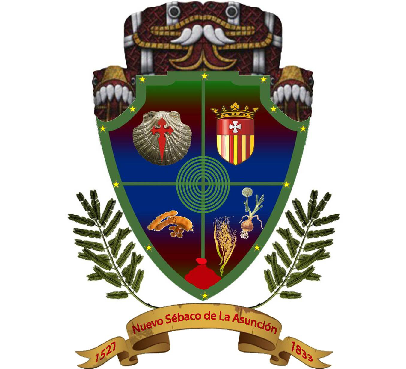 Este escudo contiene símbolos que son parte de la historia, leyenda y tradición.